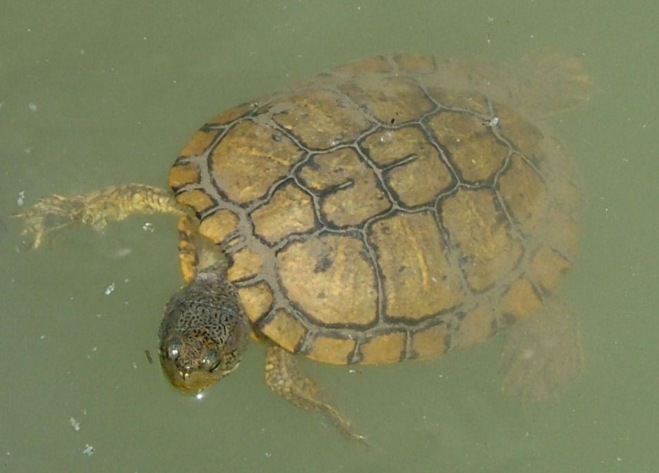 Trachemys decussata, villa Pamphilj, Roma, Italia